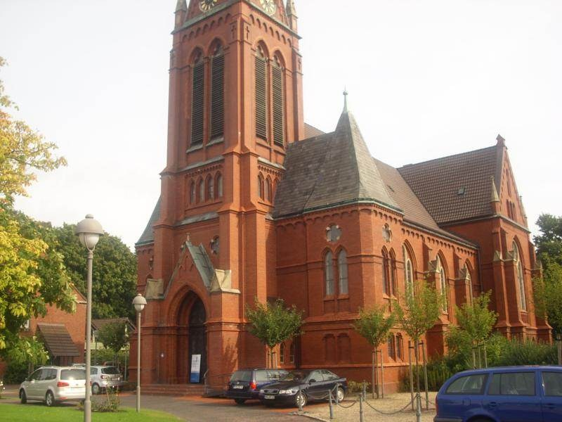 Banter Kirche 1